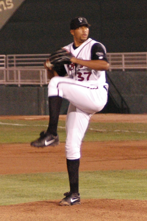 Dewon Day